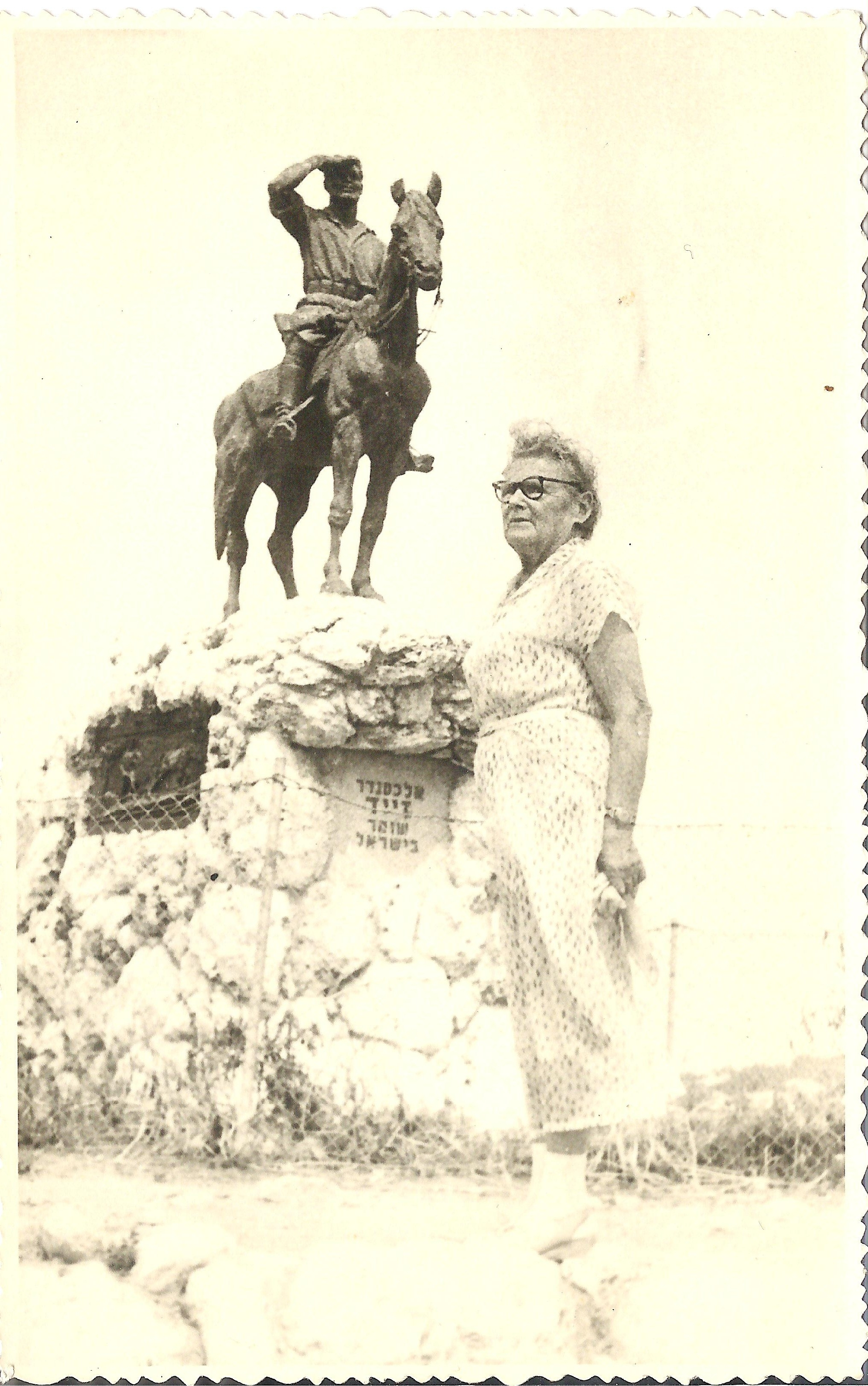 ציפורה זייד בתמונה ליד האנדרטה של בעלה המנוח אלכסנדר זייד